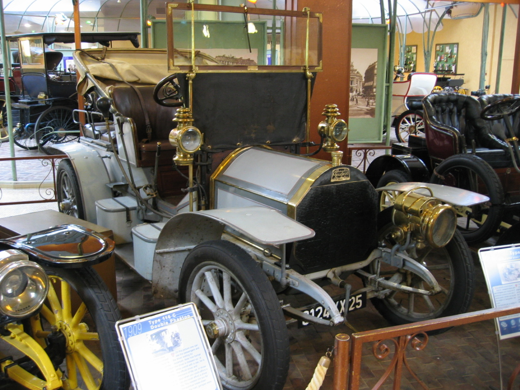 Peugeot Type 91 de 1908 - Musée Peugeot Sochaux